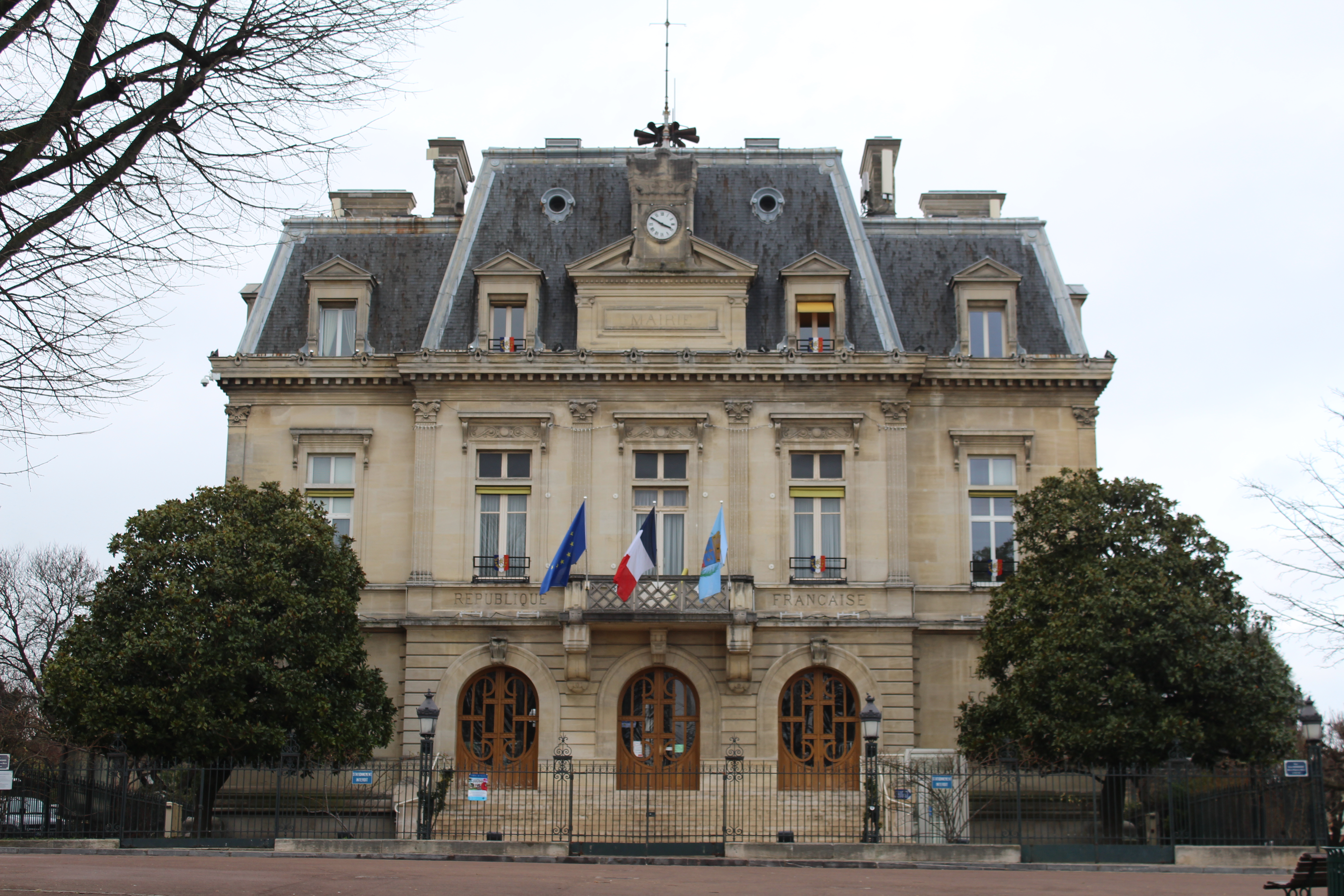 Mairie de Nogent-sur-Marne.